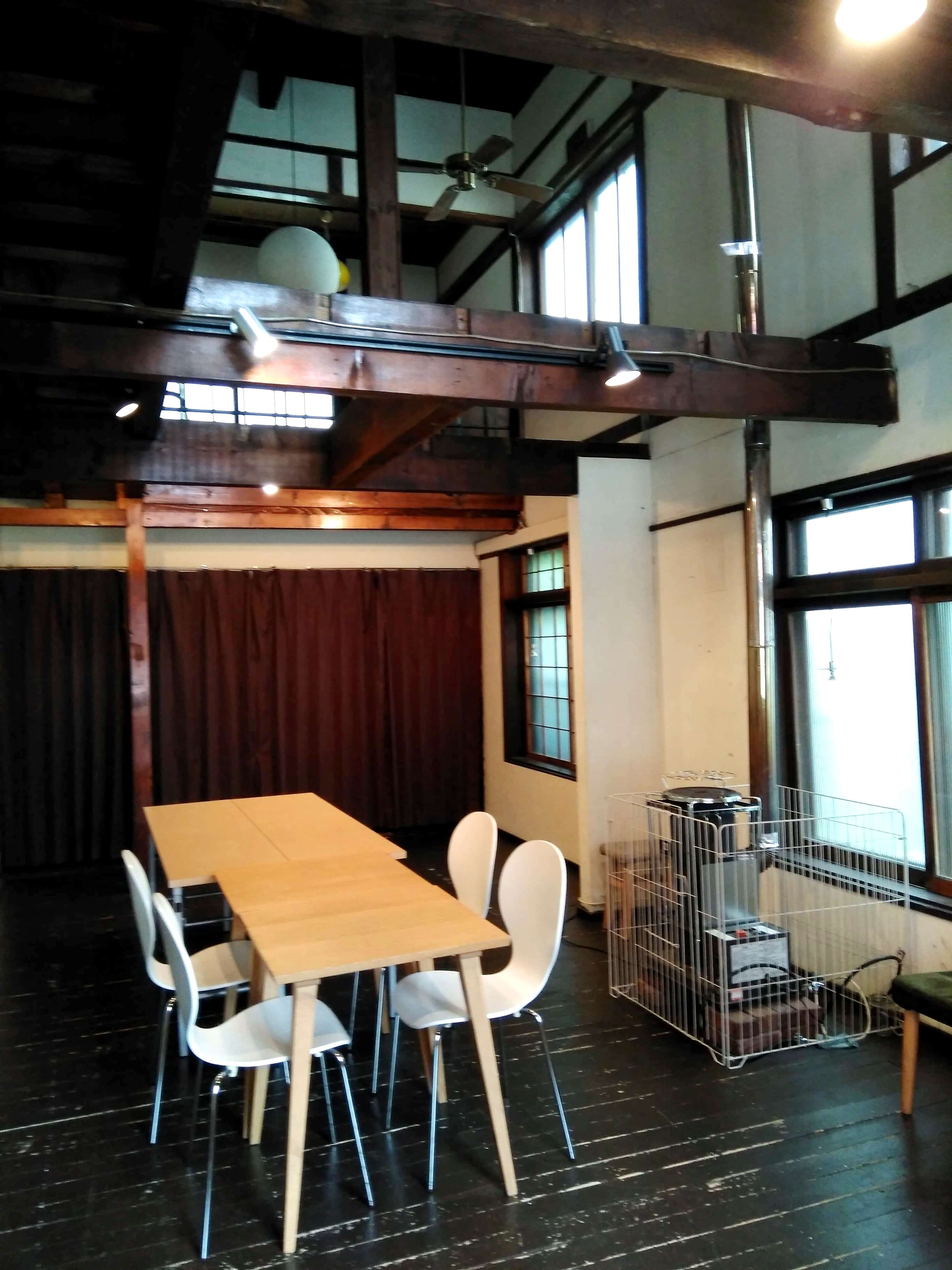 よりどこオノベカ、サロンB。吹き抜けがあります。